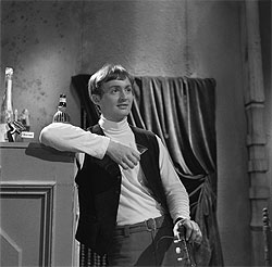 Jukka Kuoppamäki Chanson, Chanson -ohjelman nauhoituksissa 13.12.1966, kuva: Markku Vuorela